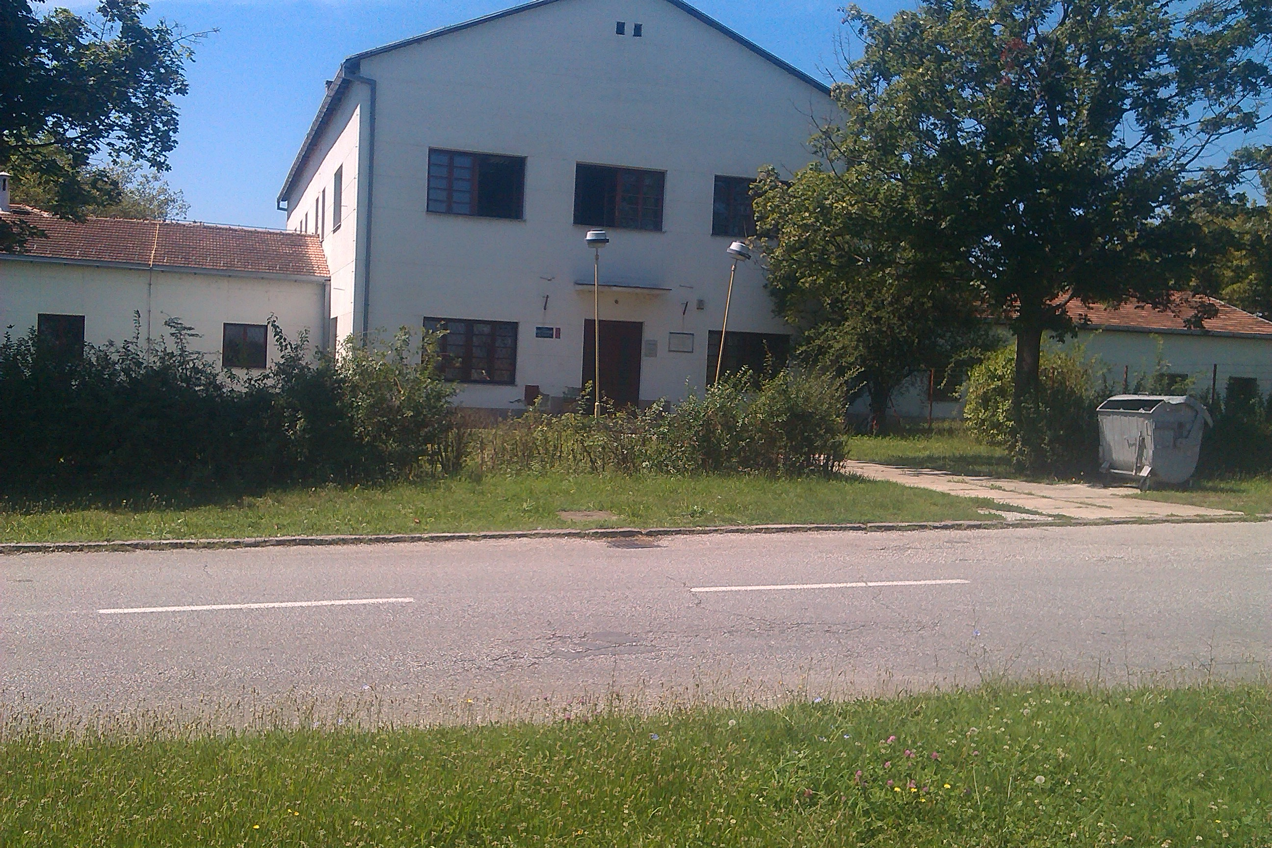 Srpski (latinica): Istorijski arhiv Šumadije u Kragujevcu